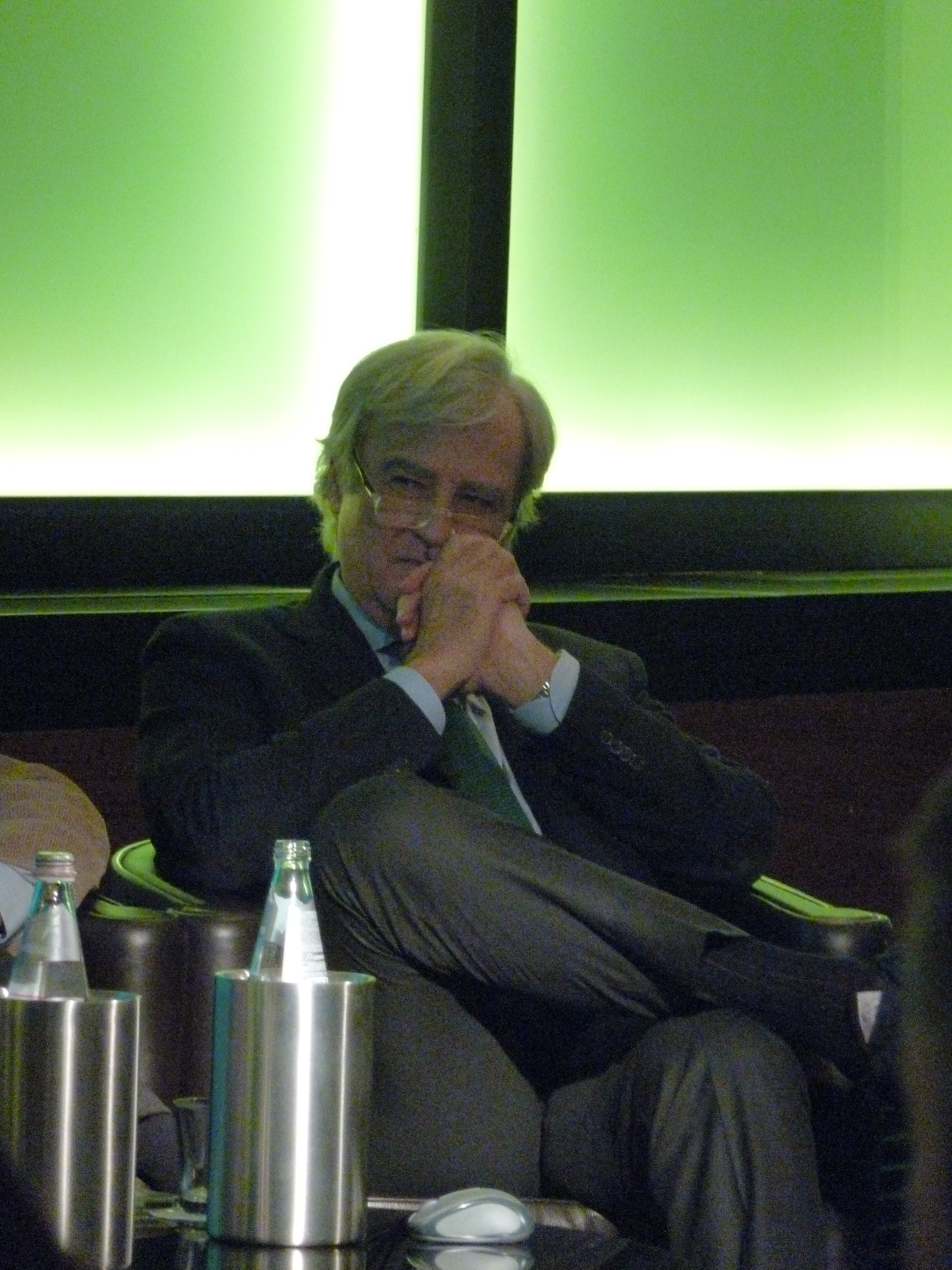 Convegno "No Euro Day" organizzato dalla Lega Nord all'Hotel dei Cavalieri a Milano, il 23 novembre 2013. Organizzatore, l'eurodeputato Matteo Salvini, mentre gli ospiti sono stati i professori Claudio Borghi, Antonio Rinaldi e Alberto Bagnai.